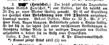 Steckbrief des Mörders Johann Gottlob Hentschel im Königlich-preußischen Central-Polizei-Blatt vom 7. Januar 1863